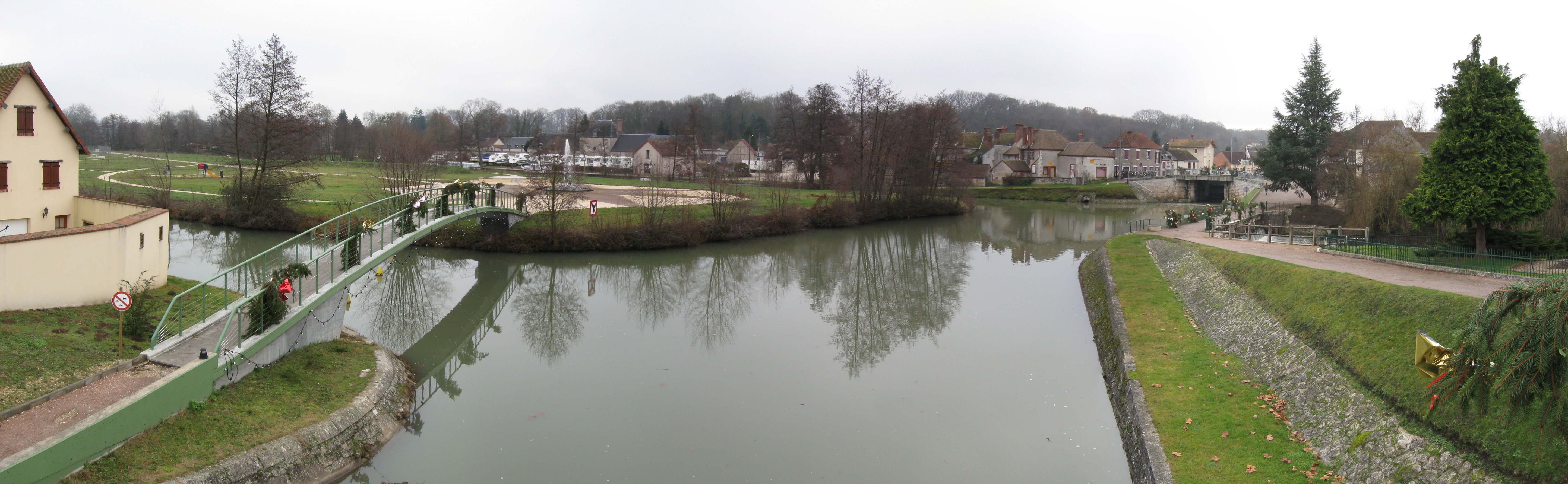 Panorama de Rogny-les-Sept-Écluses